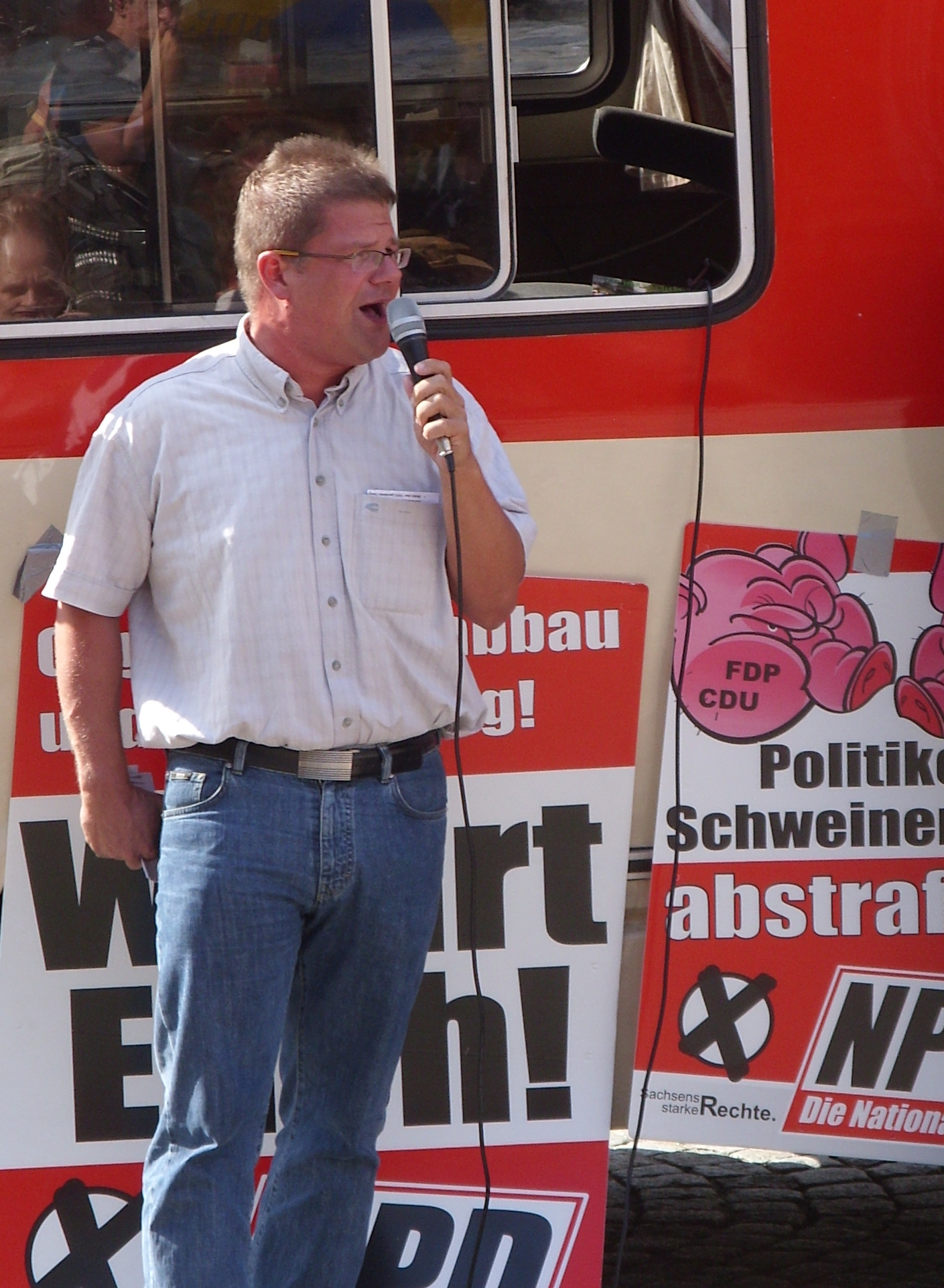 Holger Apfel (NPD) bei einer Kundgebung in Bautzen. Hornjoserbsce: Holger Apfel (NPD) na demonstraciji w Budyšinje.